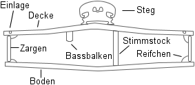 Violine im Querschnitt: das Innenleben der Violine